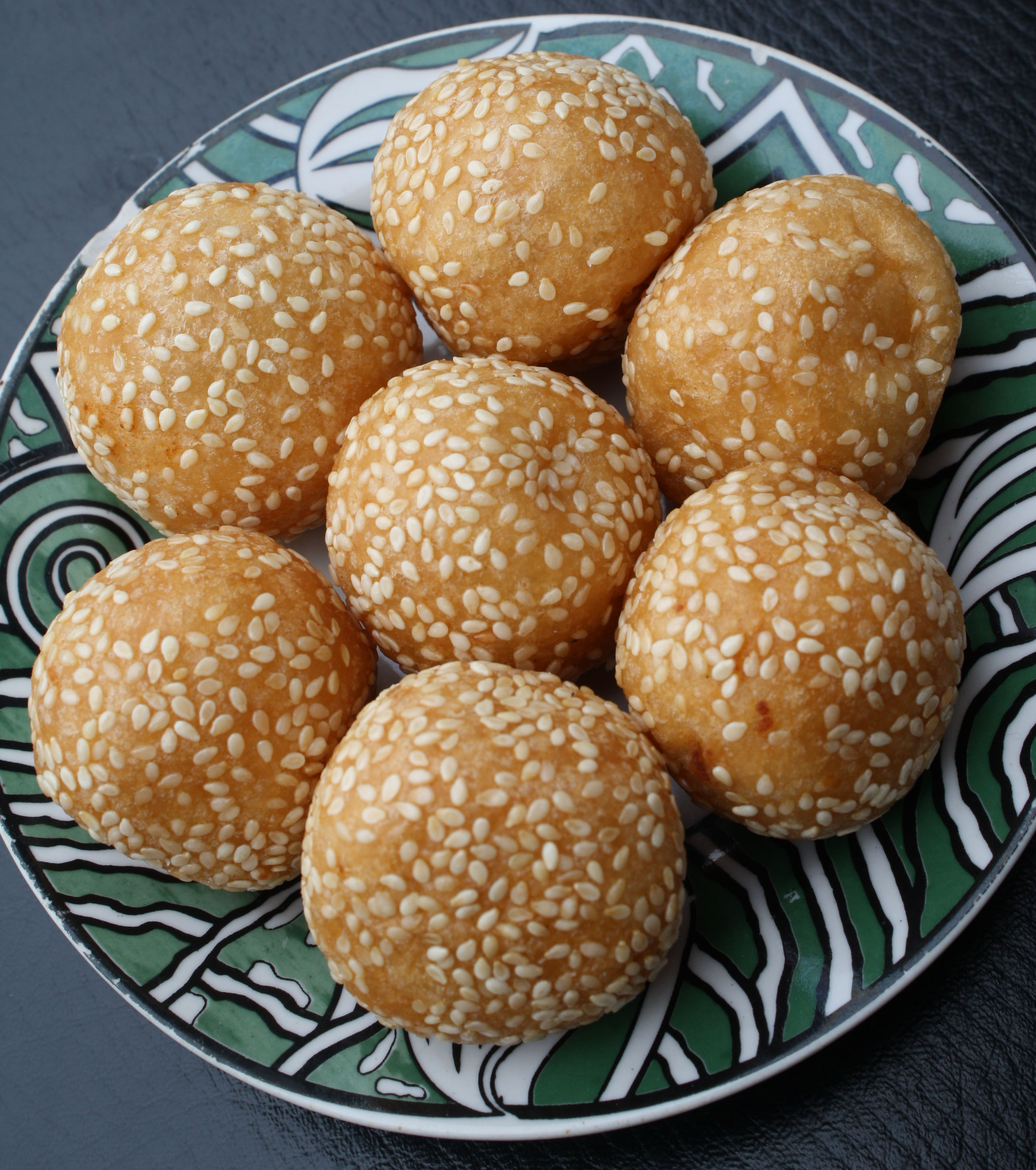 Onde-ode adalah jajanan pasar yang terbuat dari tepung ketan atau gandum